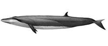 Rorcual Sei (Balaenoptera borealis), también conocido como rorcual boreal y rorcual de Rudolphi